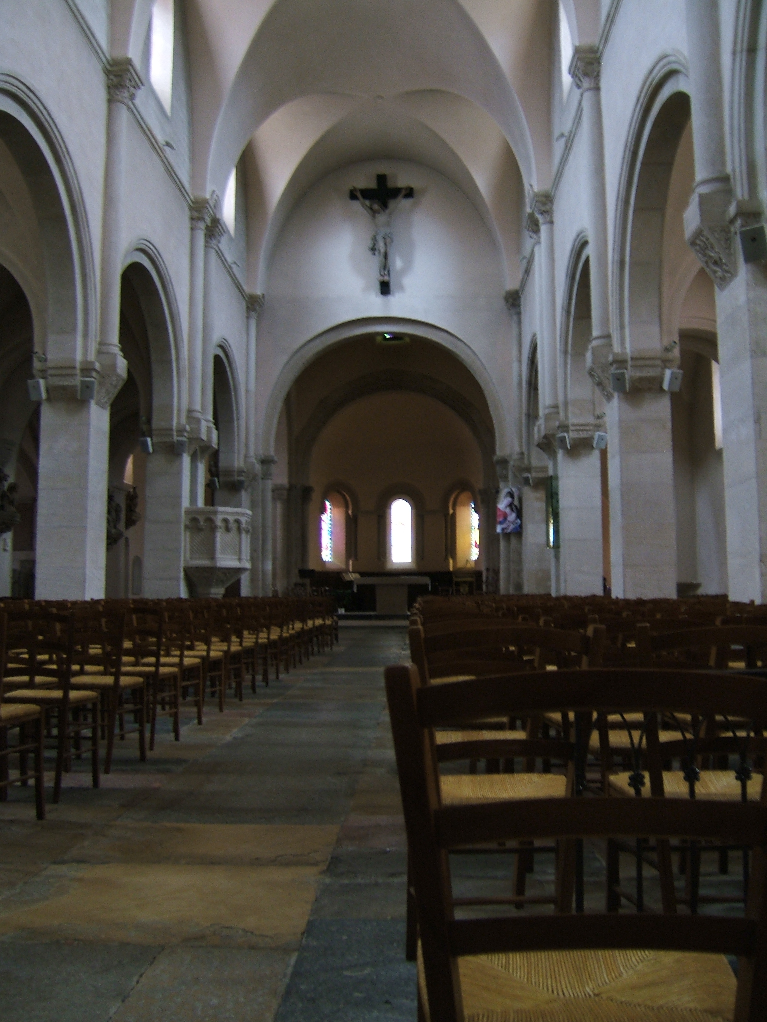 Buxy, Saint-Germain-d'Auxerre